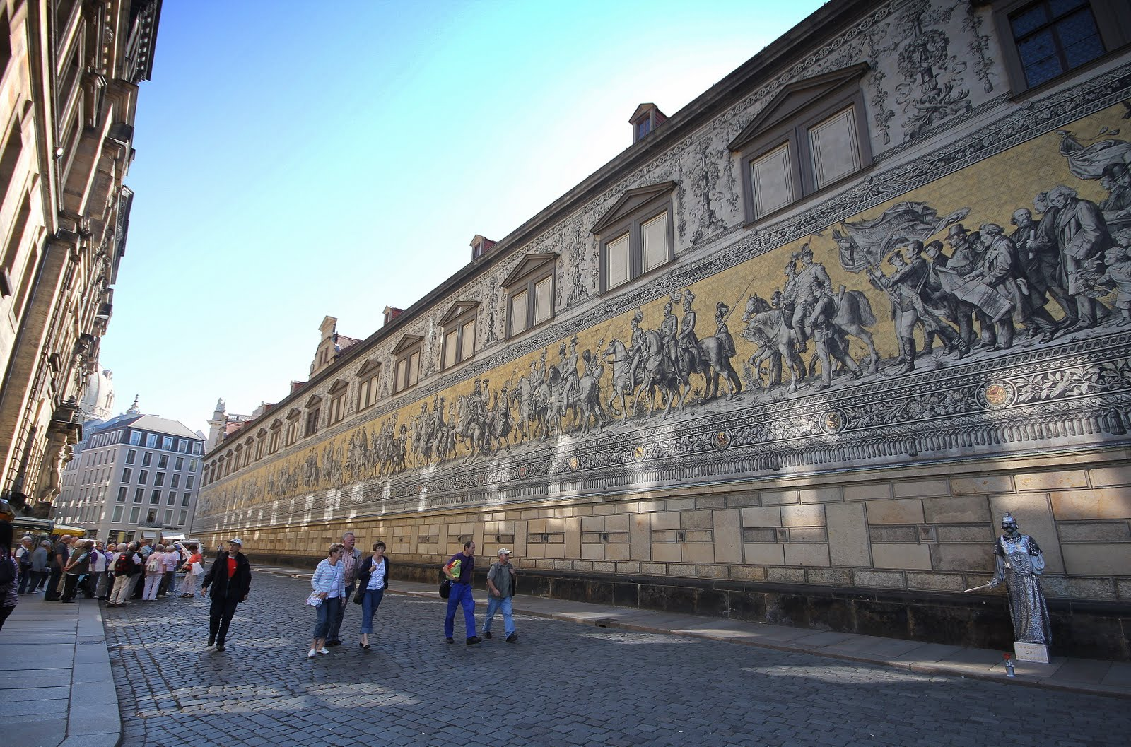 Drezda, Schloss